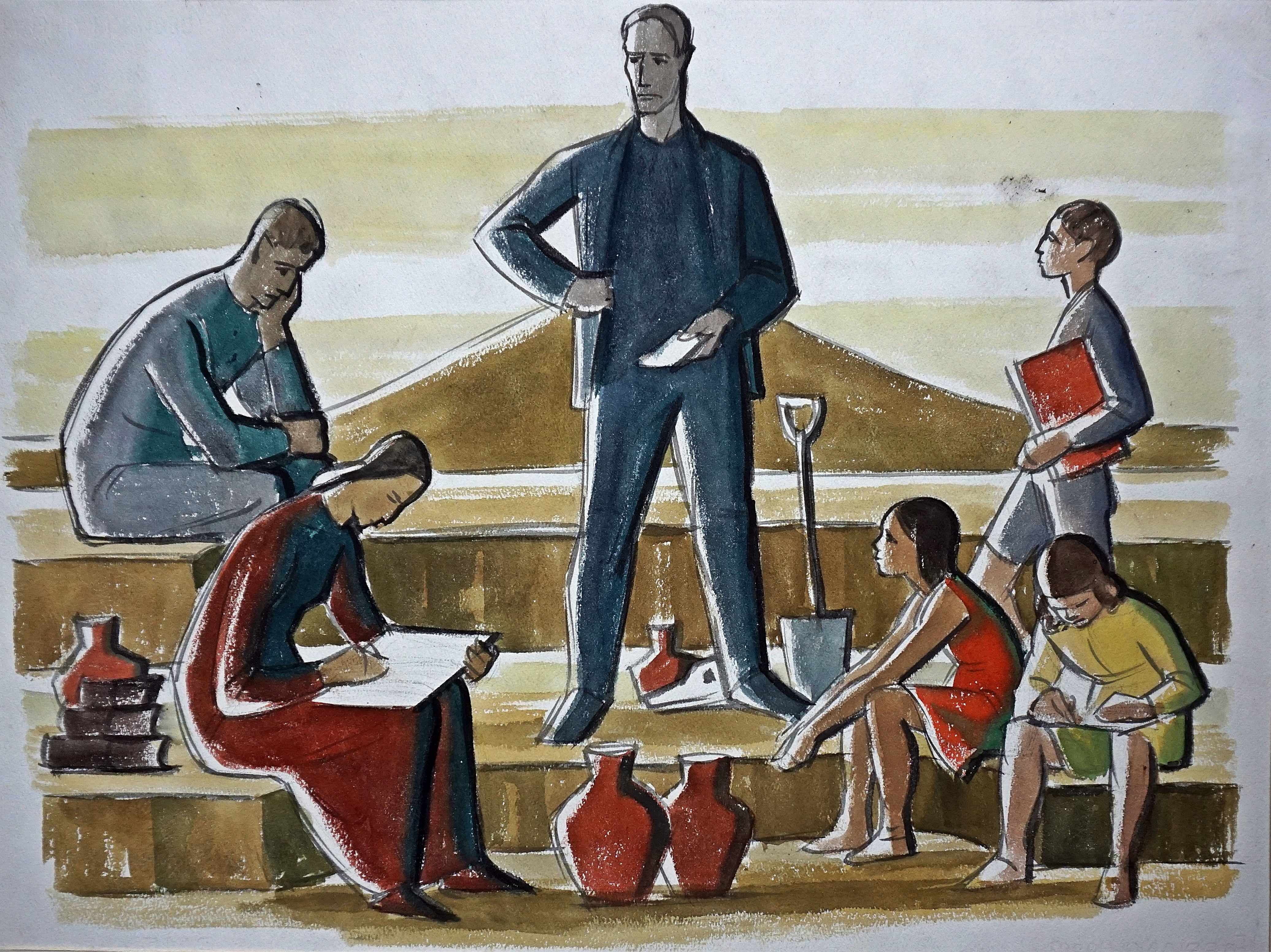 Günter Johl, Tangerhütte, Wilhelm-Wundt-Schule, Entwurf für das Wandbild "Forschung und Lehre". Das Wandbild wurde nach 1961 wegen der Republikflucht des Künstlers übertüncht. Der Entwurf befindet sich im Besitz der Tochter des Künstler, Amadee Vorsteher-Johl. Der nachdenkliche Mann links ist ein Selbstporträt Günter Johls. Das Mädchen links im gelben Kleid ist ein Porträt seiner Tochter.